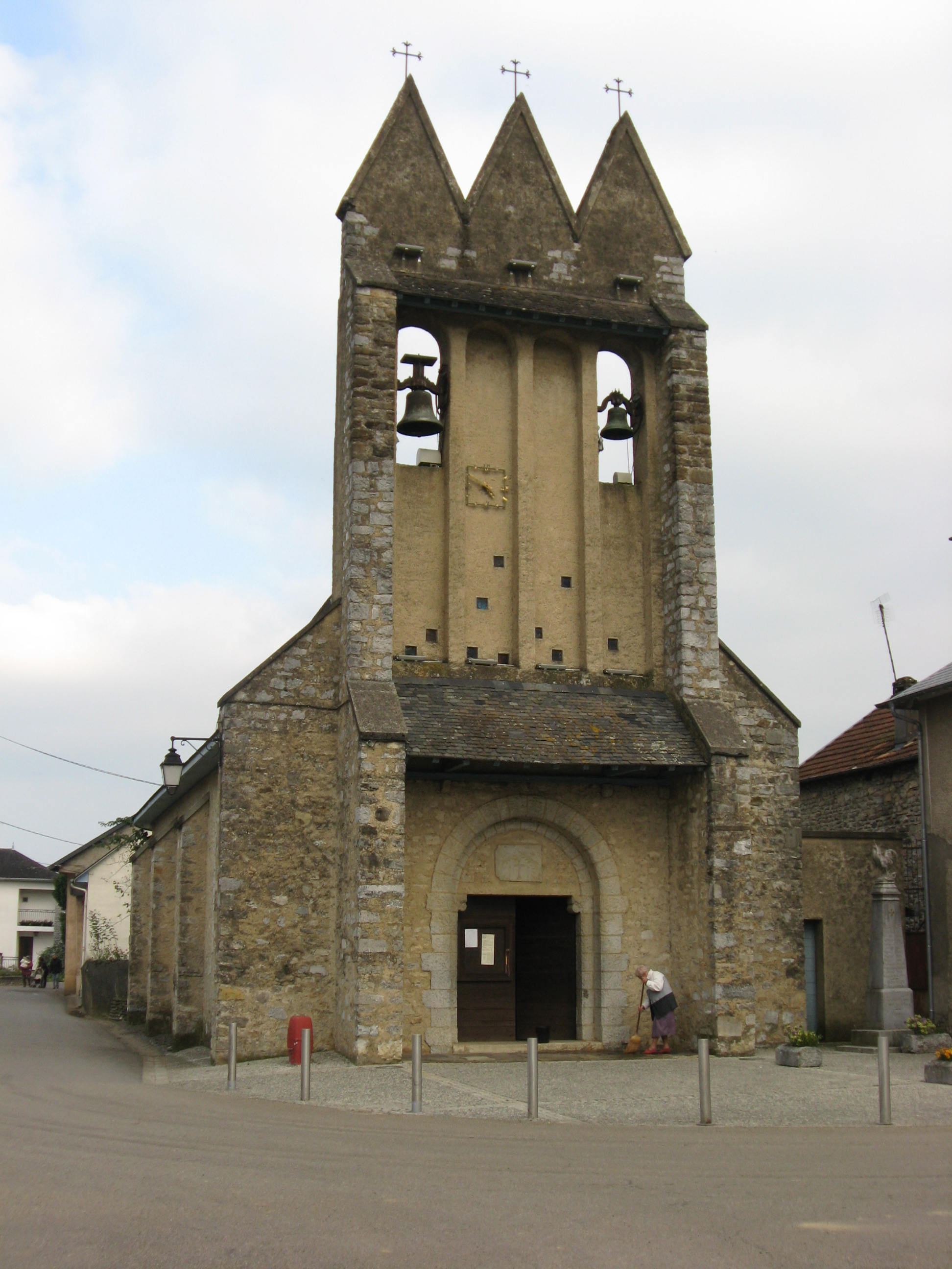 Eglise trinitéenne d'Agnos (Pyrénées Atlantiques).